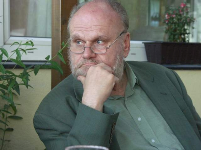 Wien